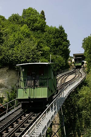 Fribourg / Freiburg: Funiculaire